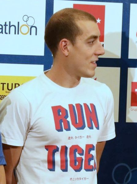 La decimocuarta edición de la Copa del Mundo de Triatlón se ha presentado hoy jueves, 18 de mayo, en el Ayuntamiento de Madrid, en un acto presidido por la coordinadora general de Cultura, Deporte y Turismo, María del Carmen Rojas, y en que también han participado José Hidalgo Martín, Presidente de la Federación Española de Triatlón y los deportistas olímpicos Míriam Casillas, Fernando Alarza y el doble campeón de Europa de Triatlón sub 23, David Castro, entre otras personalidades.